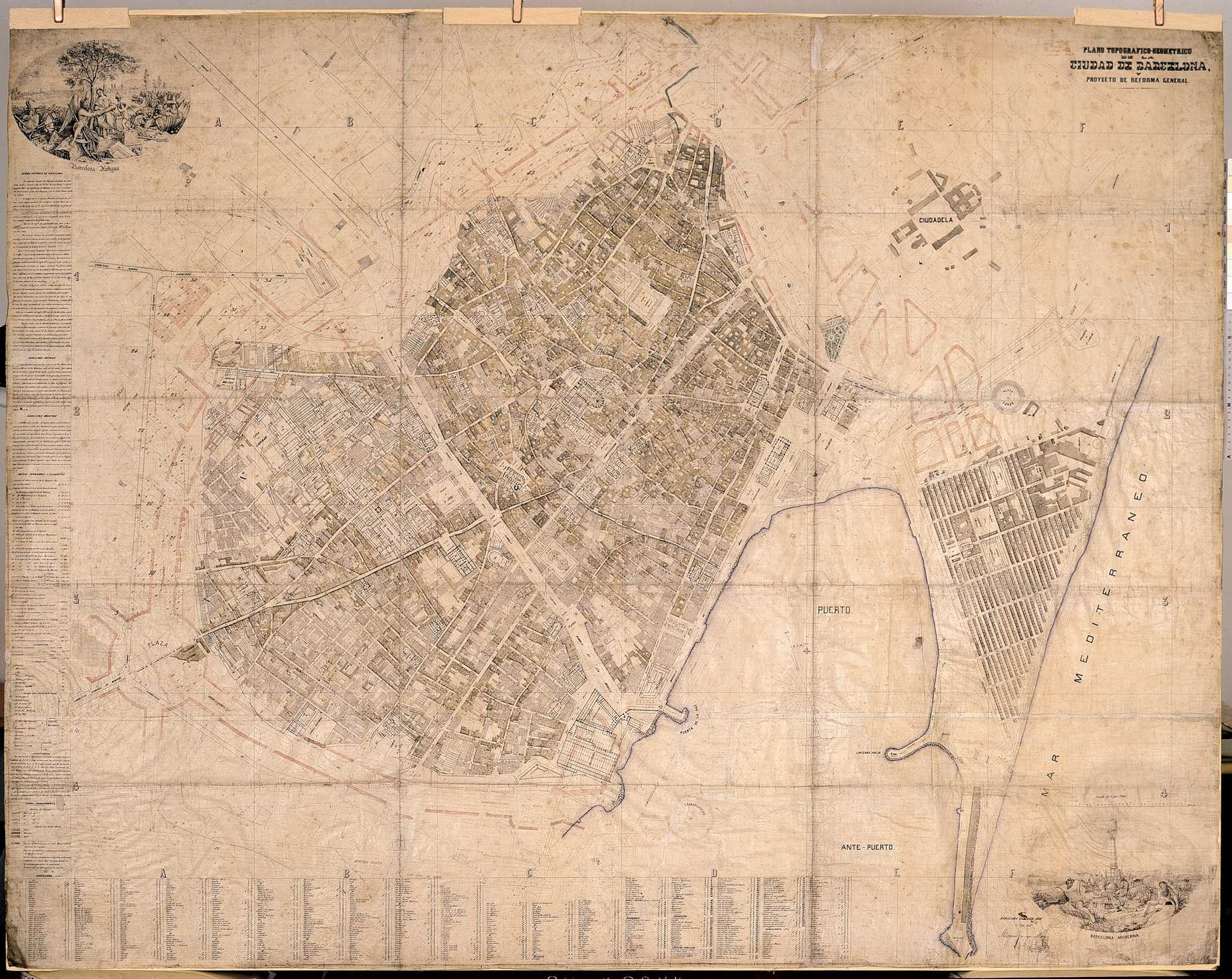 Plànol de la ciutat de Barcelona de 1862, obra de Miquel Garriga i Roca